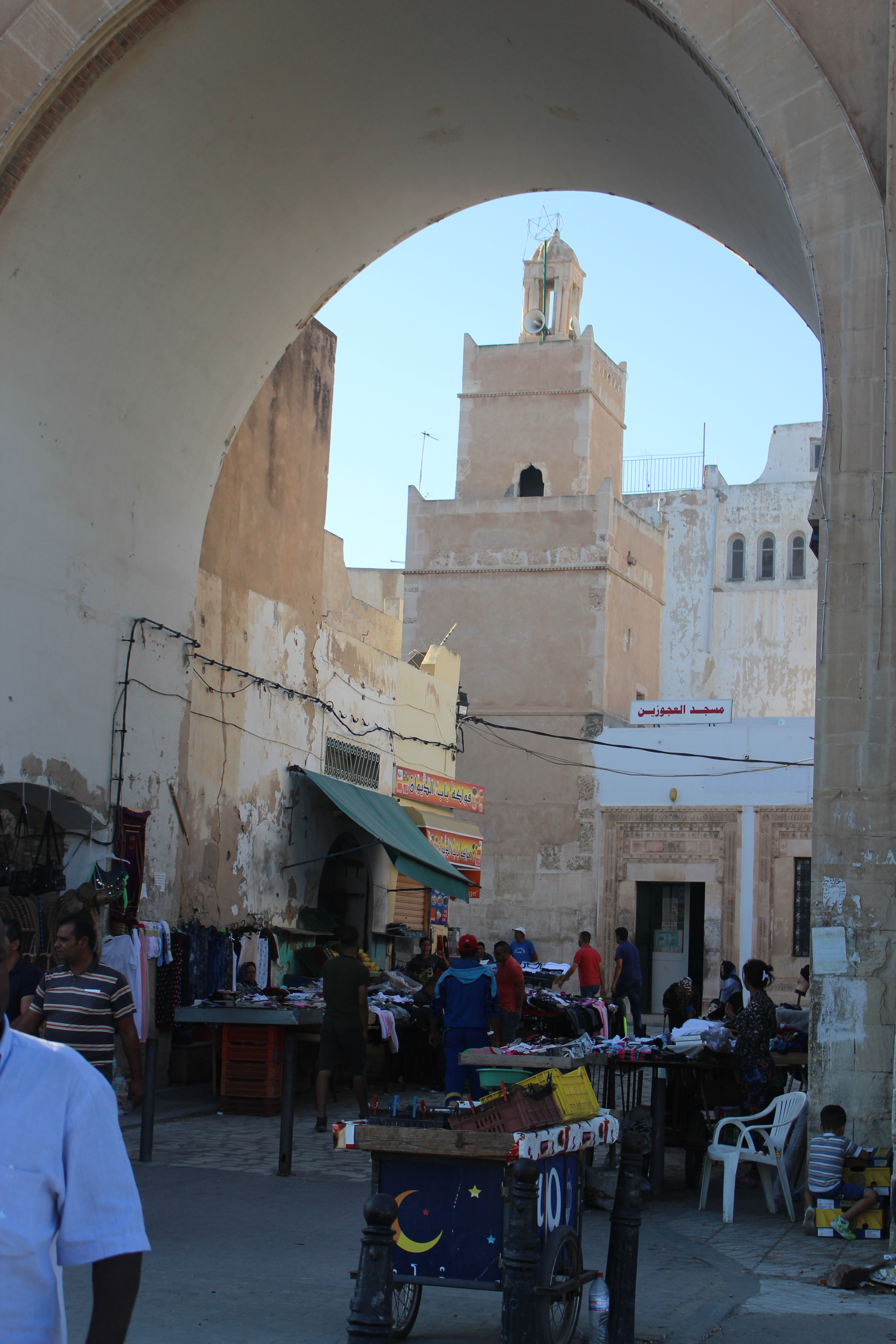 Minaret de la mosquée Ajouzine à Bab Bhar